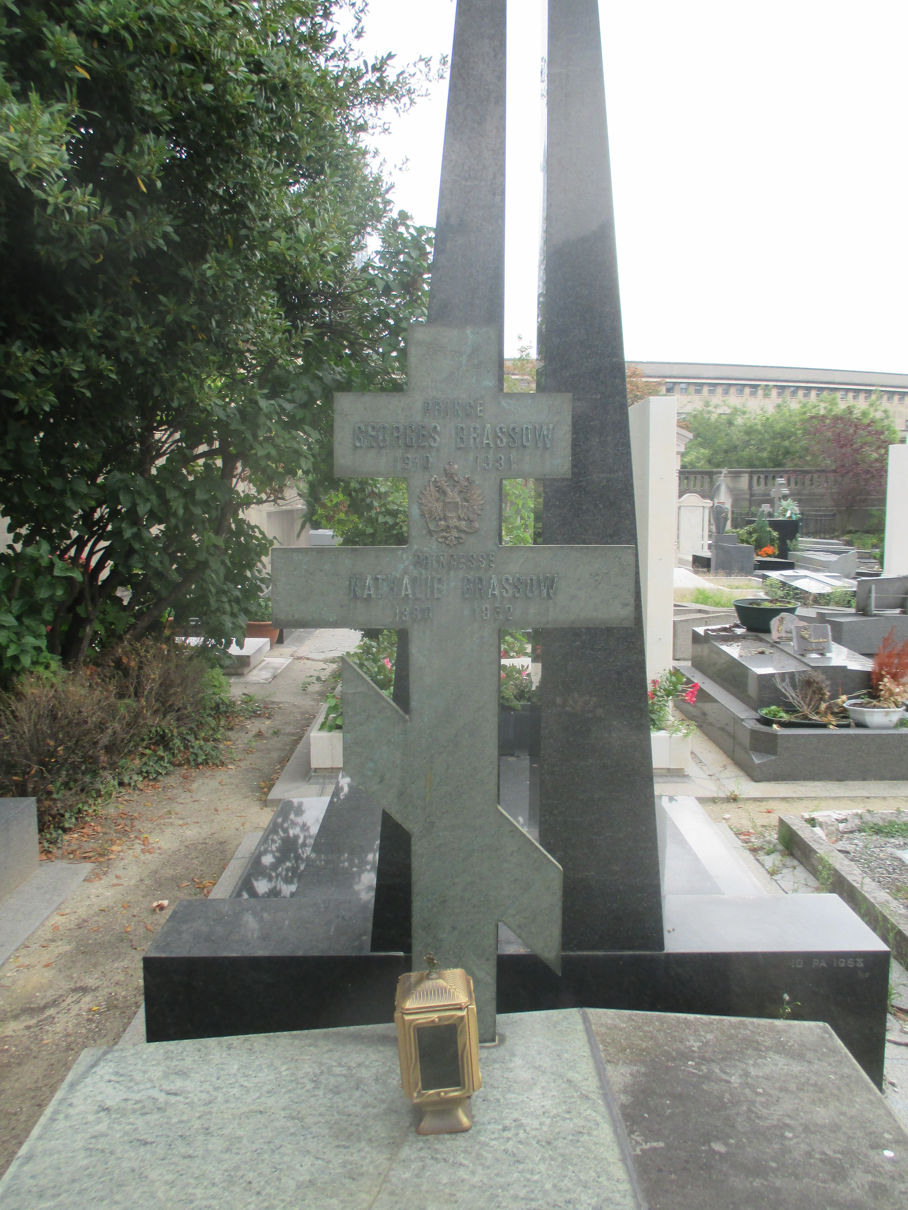 Cimetière de Passy. Croix de la sépulture des Brassow.